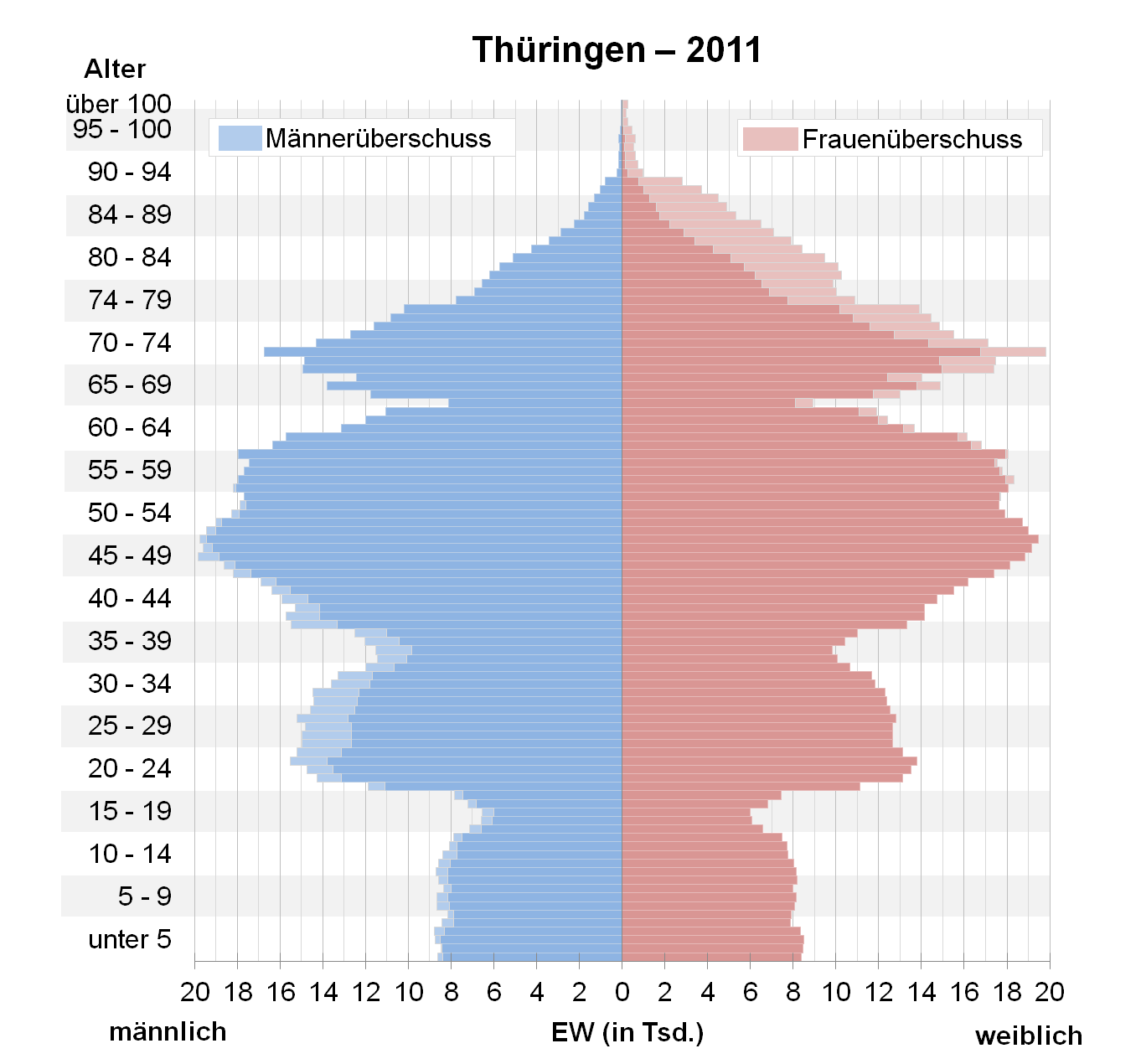 Bevölkerungspyramide des Bundeslandes Thüringen nach Zensus 2011.